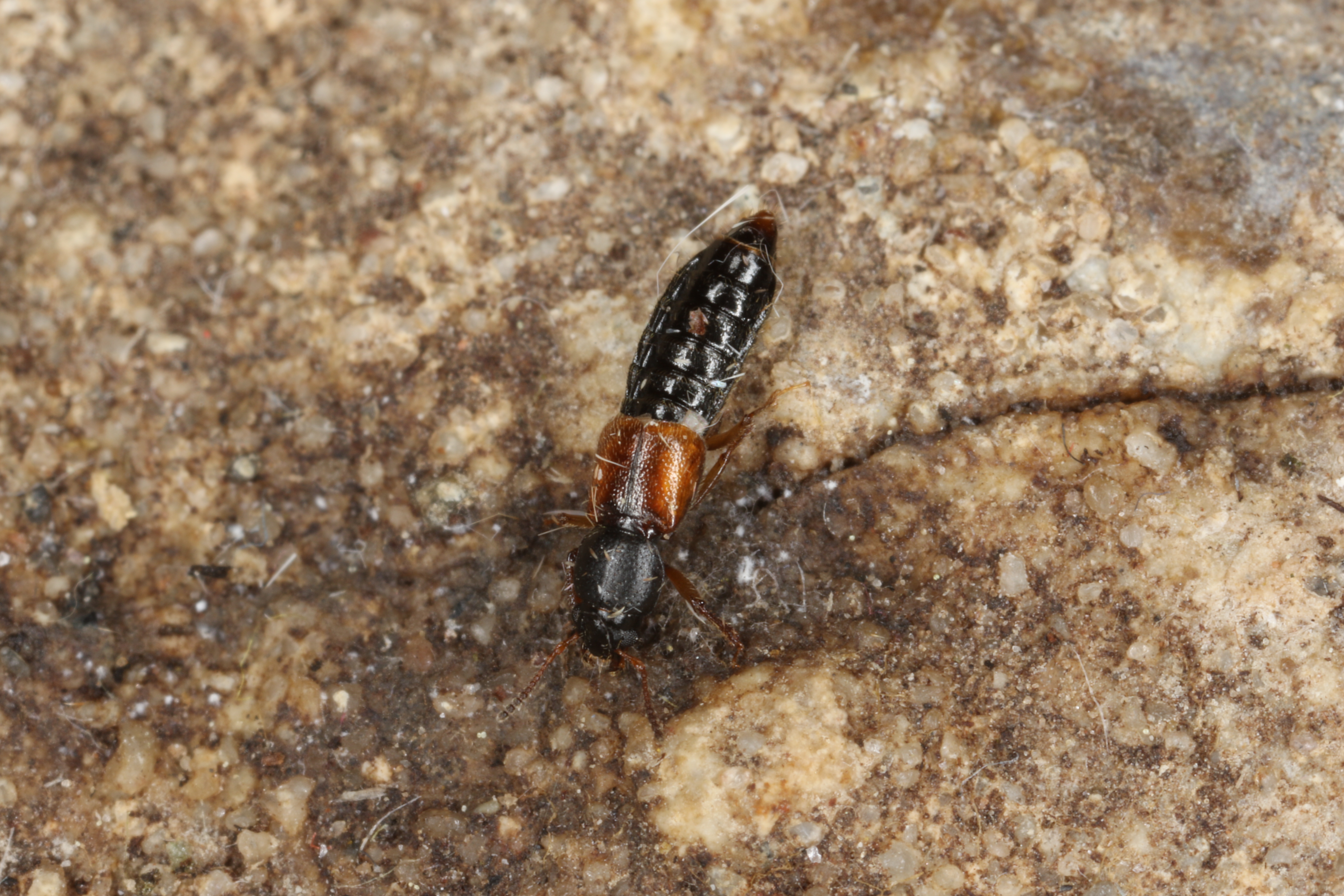 Bledius opacus (Block, 1879), to MV light, Søborg, Denmark, 2 June 2016